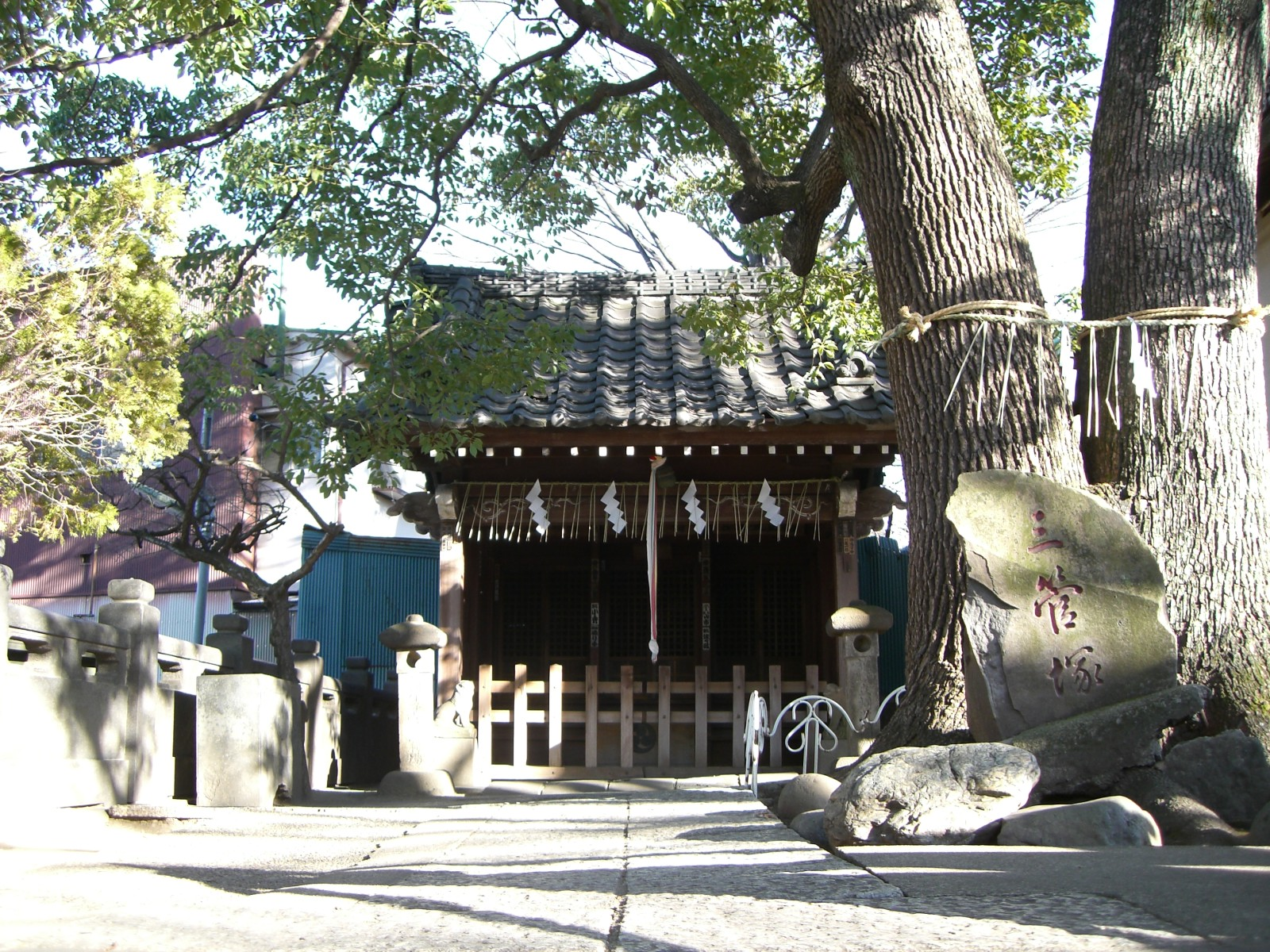 氷川神社境内社高正天満宮